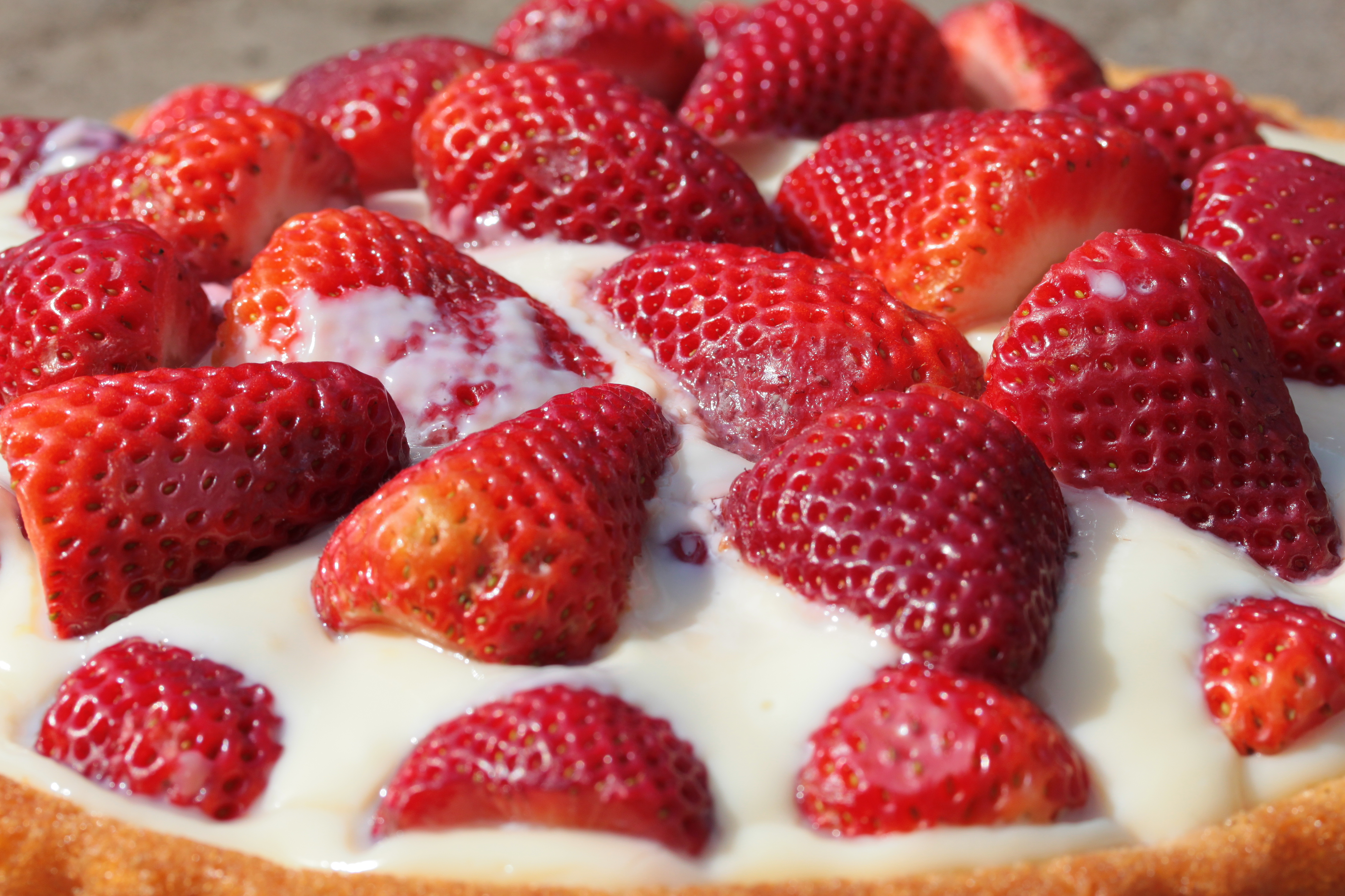 Erdbeer-Pudding-Kuchen (fertiger Tortenboden, Vanillepudding, frische Erdbeeren)